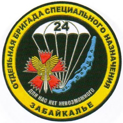 Эмблема 24-й отдельной бригады специального назначения